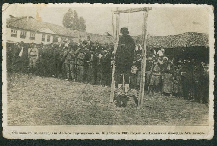 Обесването на македонския войвода Александър Турунджев на Битолския Ат пазар в 1905 година.